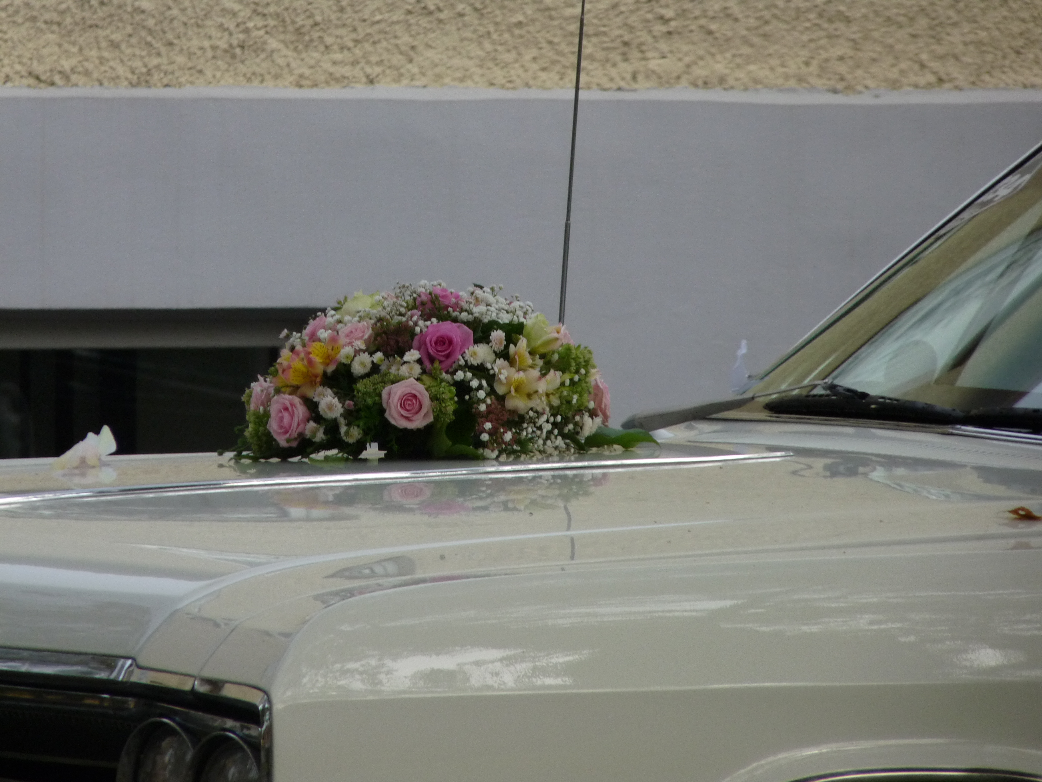 Pruutpaari autot ehib sageli lillekimp või pärg. Pulmaauto Tartus õnnepalee ees, 22. september 2012